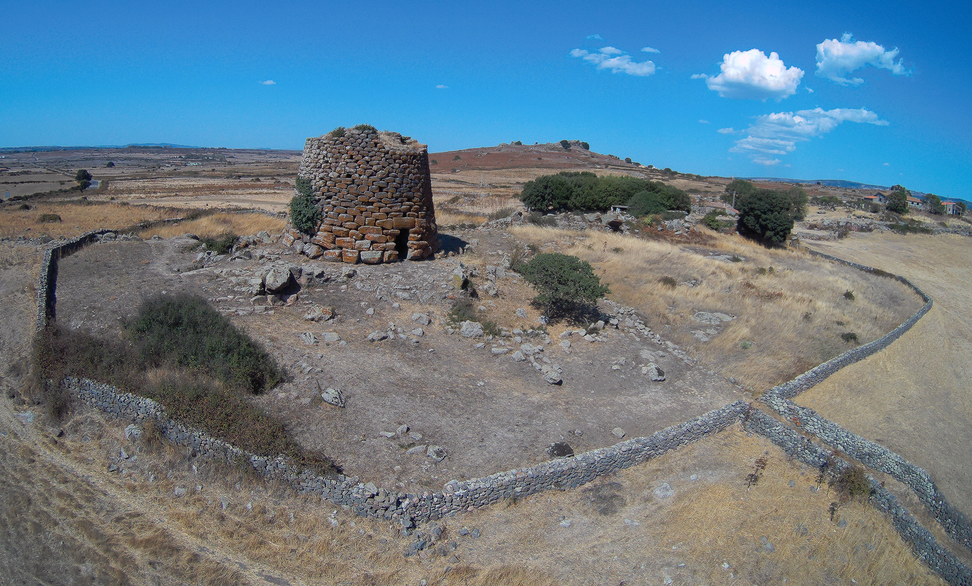 Veduta aerea del nuraghe Succoronis e del paesaggio circostante. This is a photo of a monument which is part of cultural heritage of Italy.